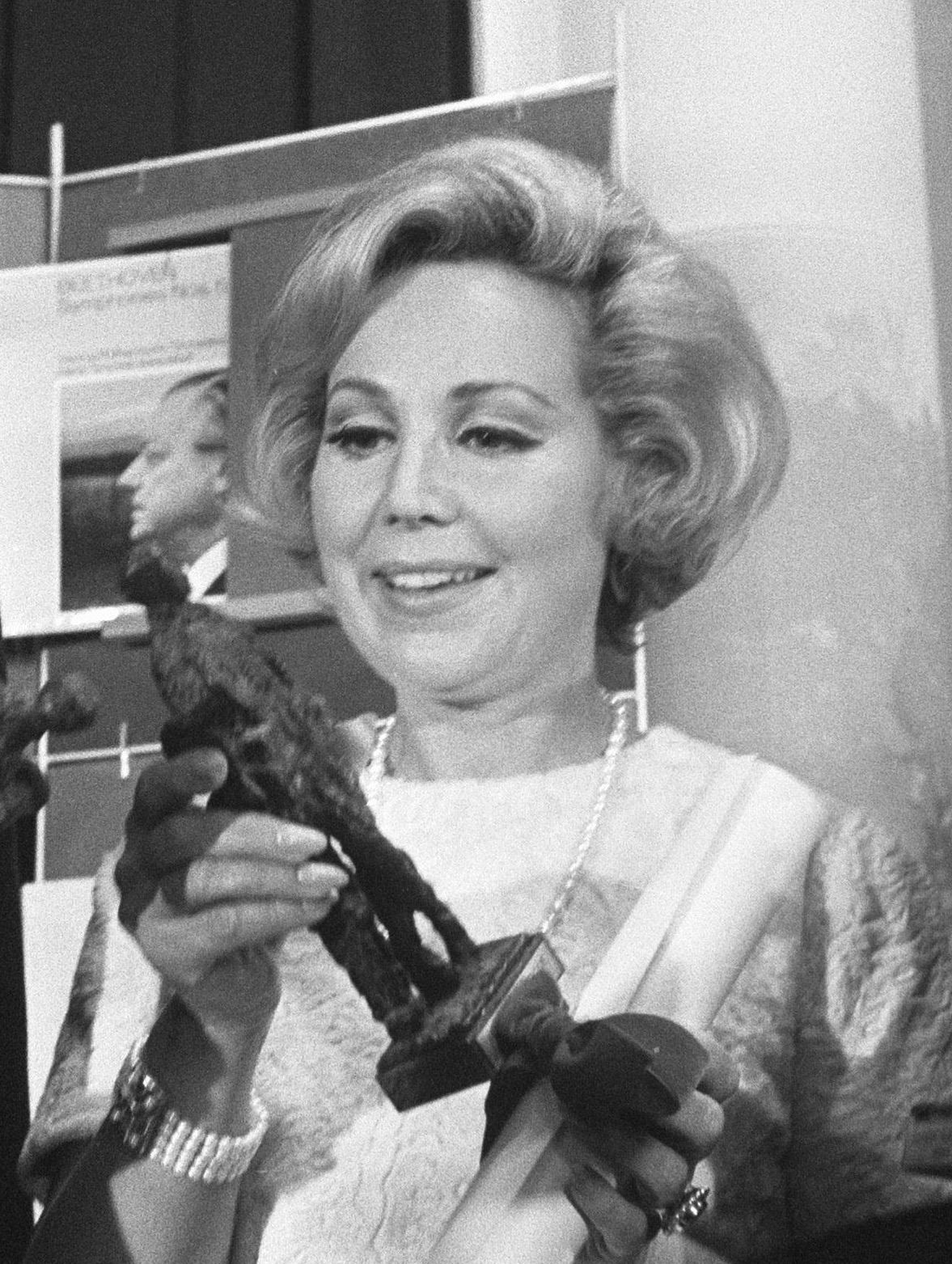 Klassieke Edisons 1969 uitgereikt Concertgebouw A'dam. Anneliese Rothenberger.